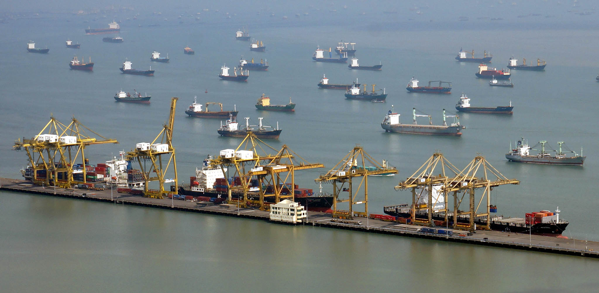 Sumber